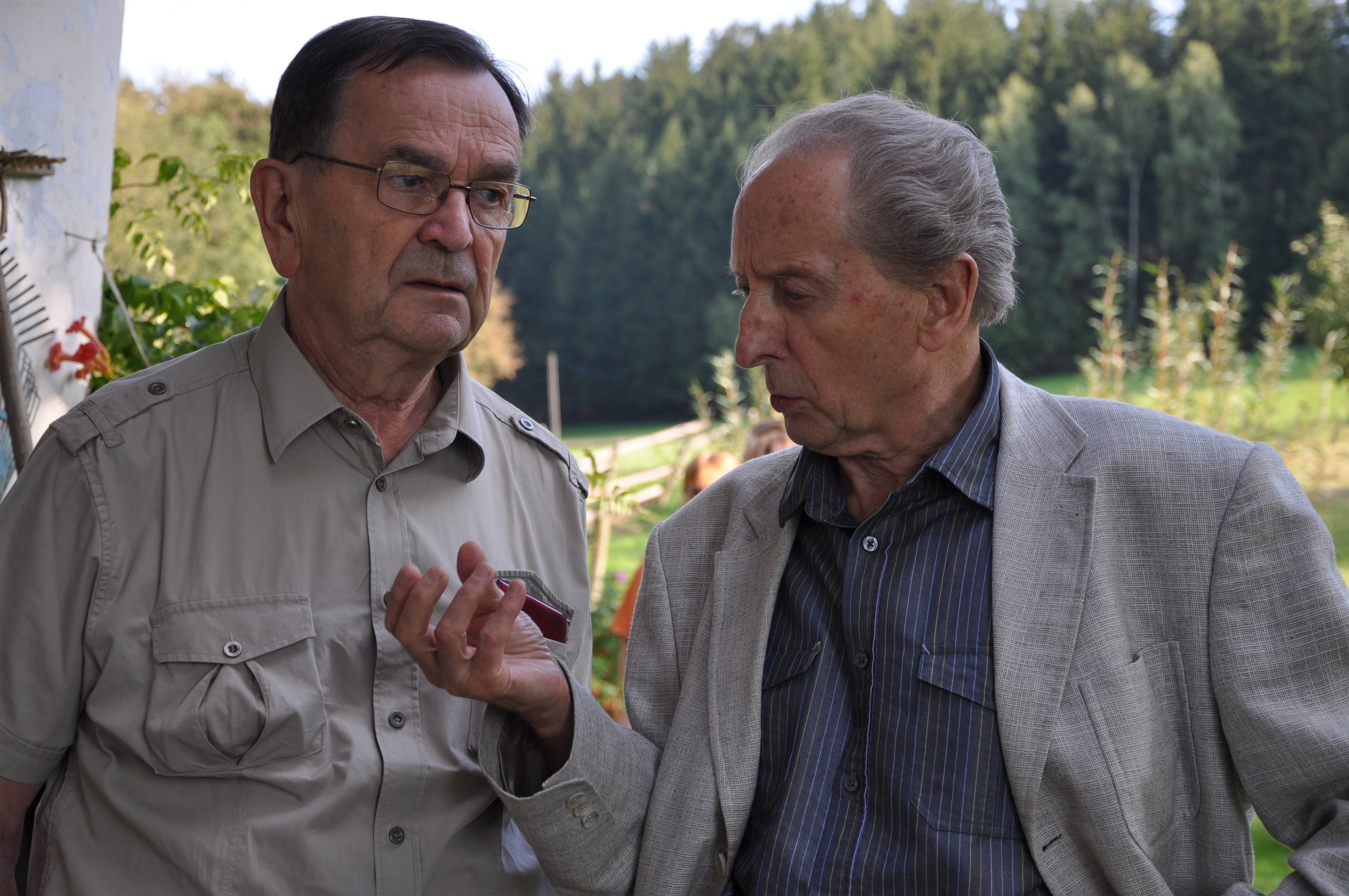 Jan Čapek a Jakub S. Trojan